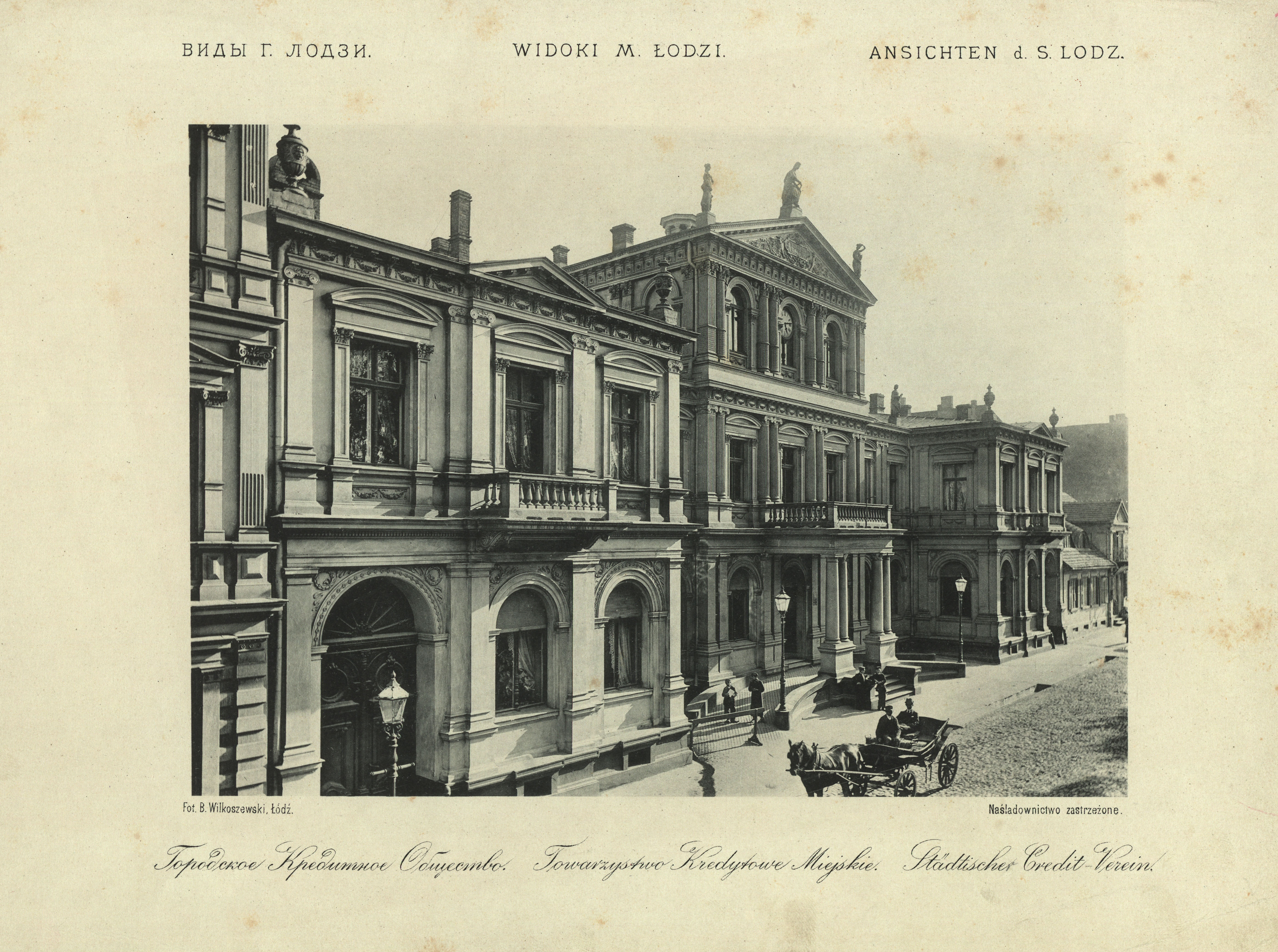 Towarzystwo Kredytowe Miejskie w Łodzi